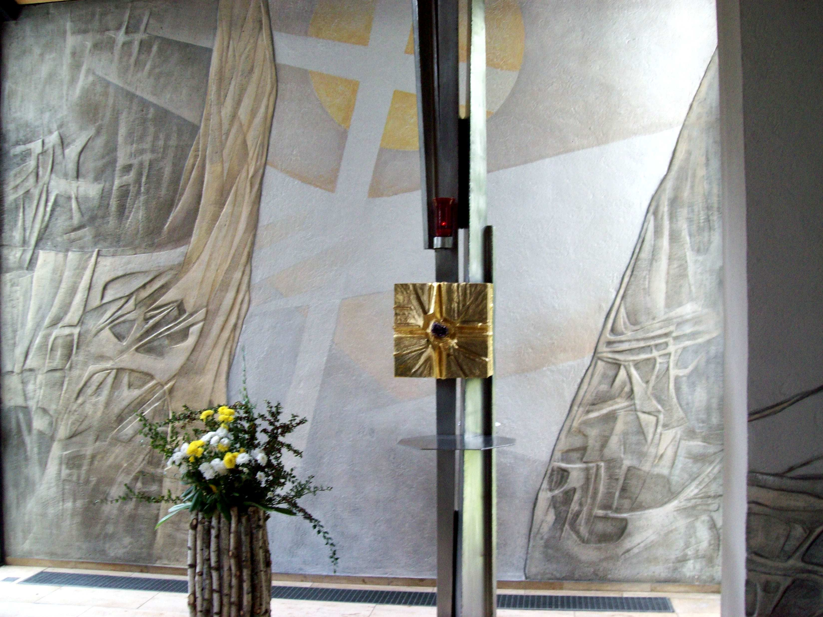 St. Pius Aschaffenburg Tabernakelstele geschaffen von Hans Huschka aus Laudenbach bei Miltenberg, Tabernakel von Hermann Kröckel, Aschaffenburg, Wandgestaltung von Siegfried Rischar, Aschaffenburg